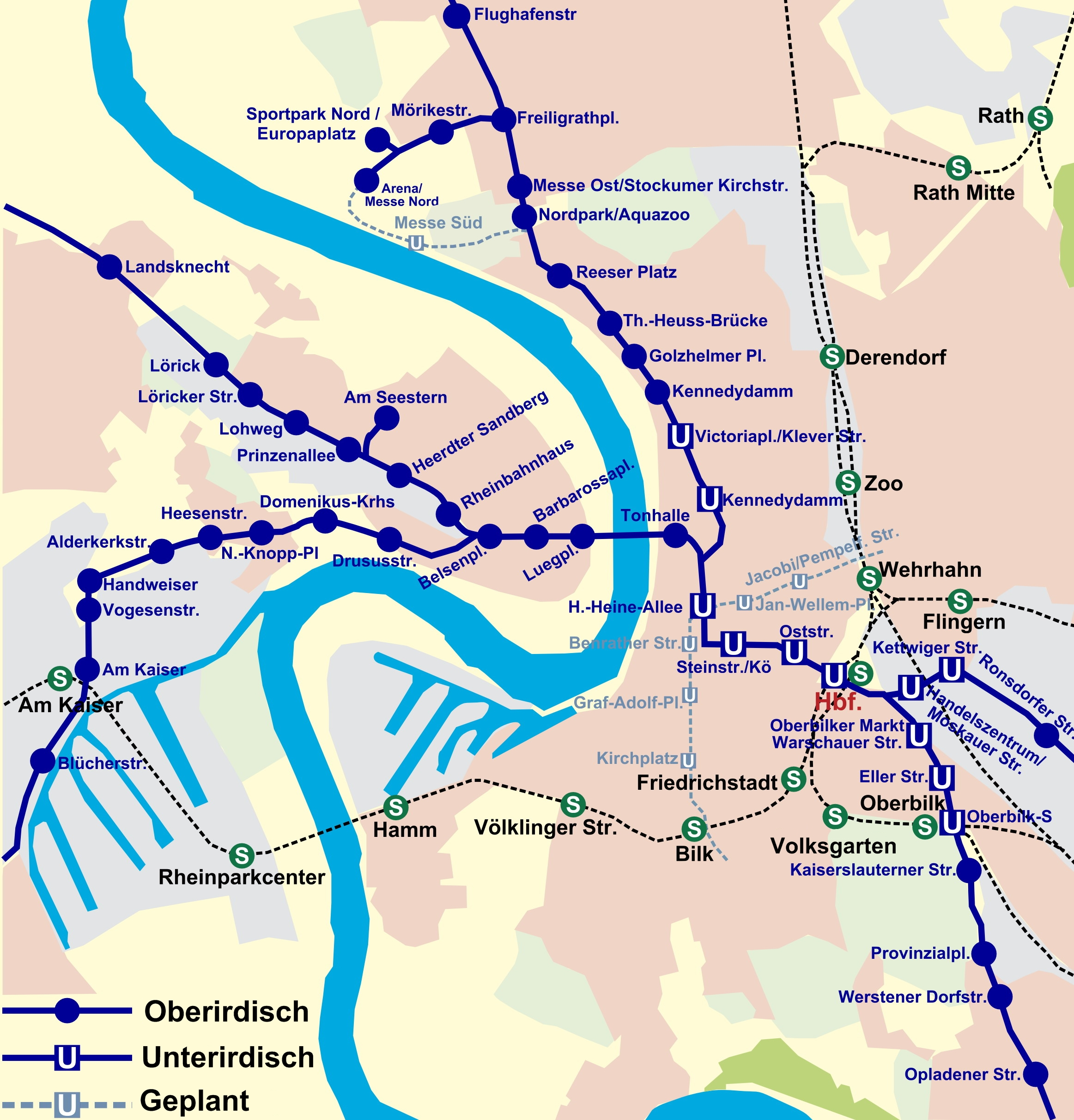 Stadtbahnplan von Düsseldorf